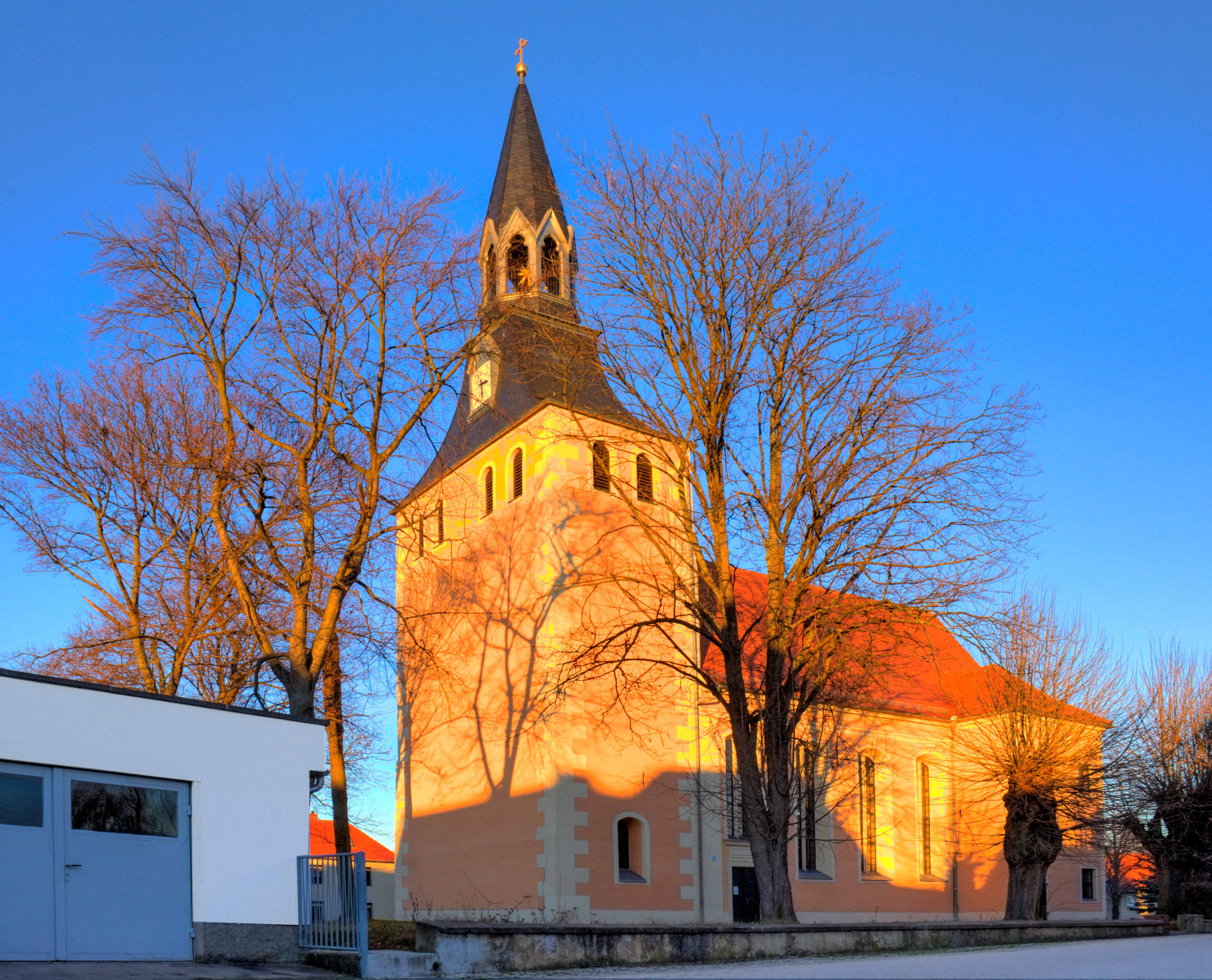 Kirche Alte Schulstraße in Wermsdorf OT Calbitz